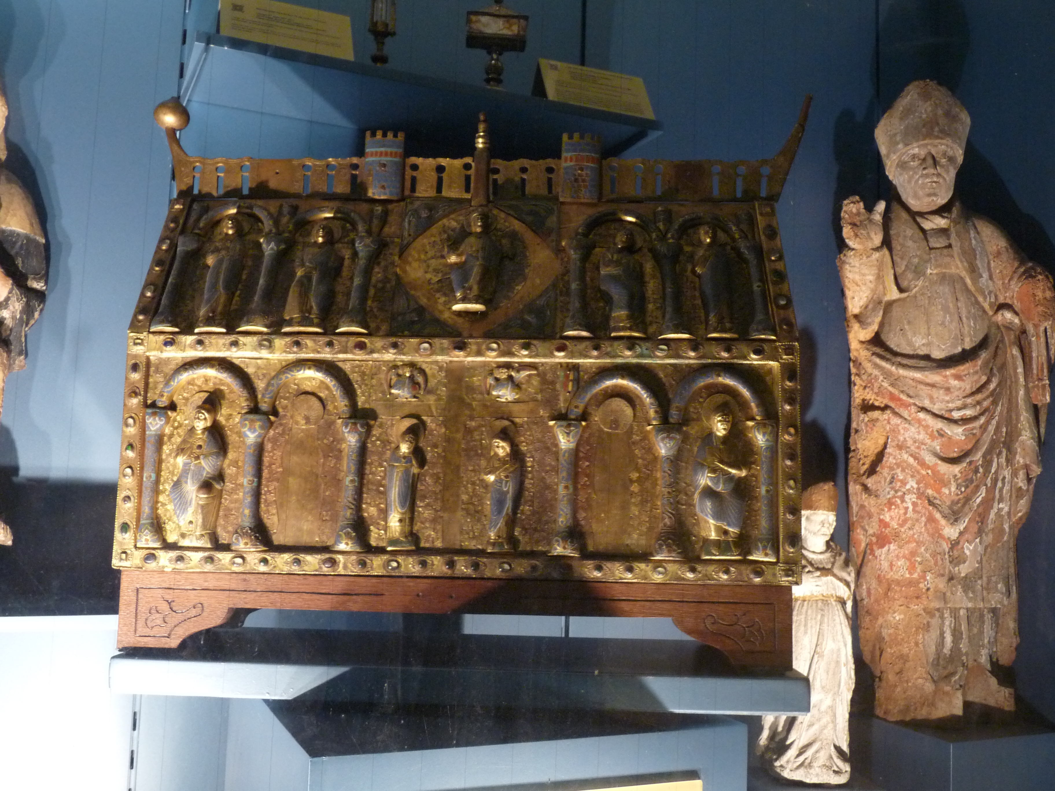 Chasse reliquaire de Saint Dulcet situé dans l'église Saint Dulcet de Chamberet (Corrèze)